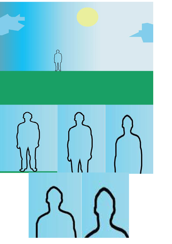 Plano motak enkoadrearen arabera. Goitik behera eta ezkerretik eskuinera: plano oso orokorra, orokorra, amerikarra, plano ertaina, lehen plano ertaina eta lehen planoa